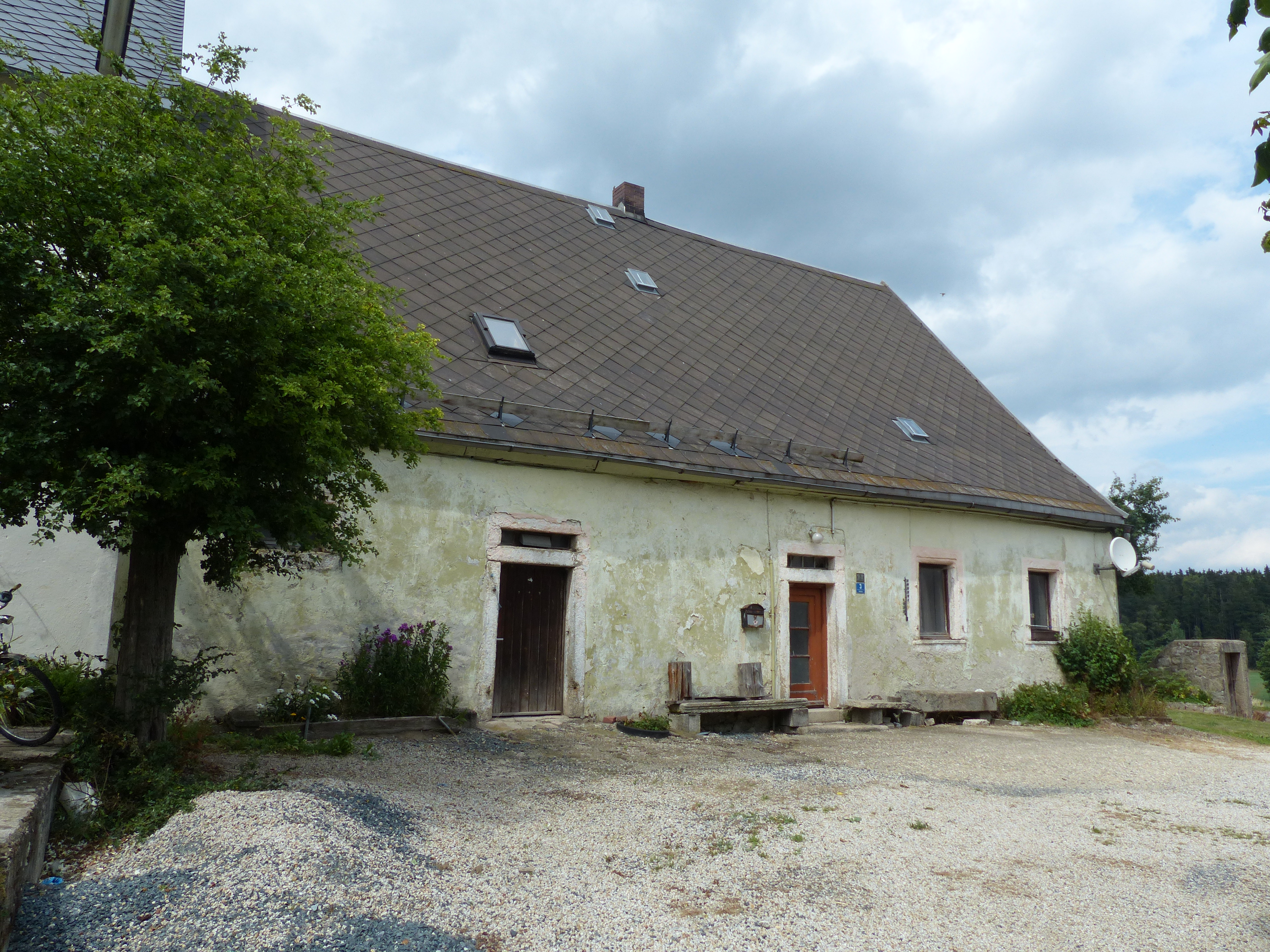 Bauwerke der Stadt Weißenstadt